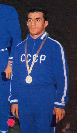 Rafig Hajiyev